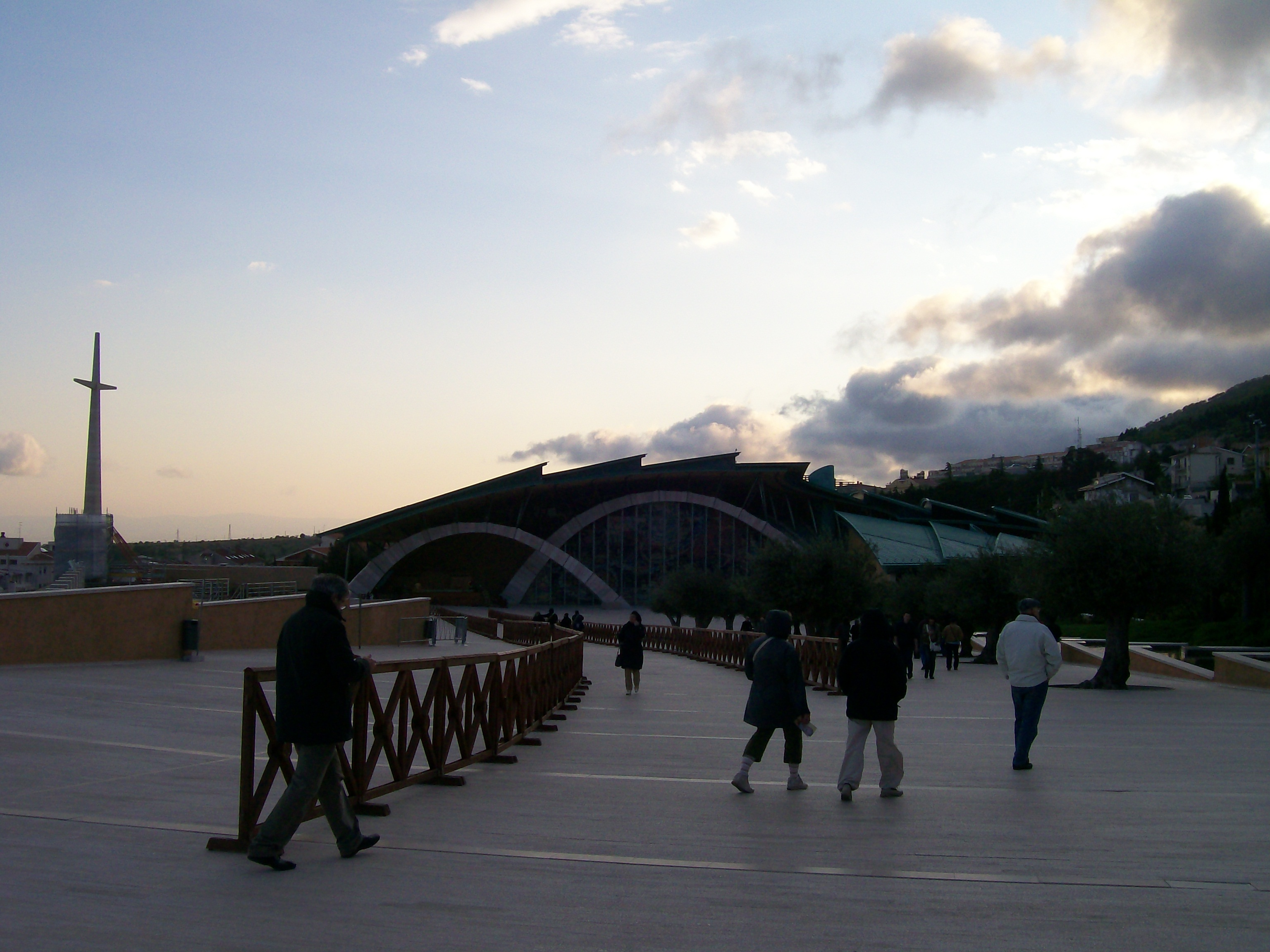 chiesa nuova